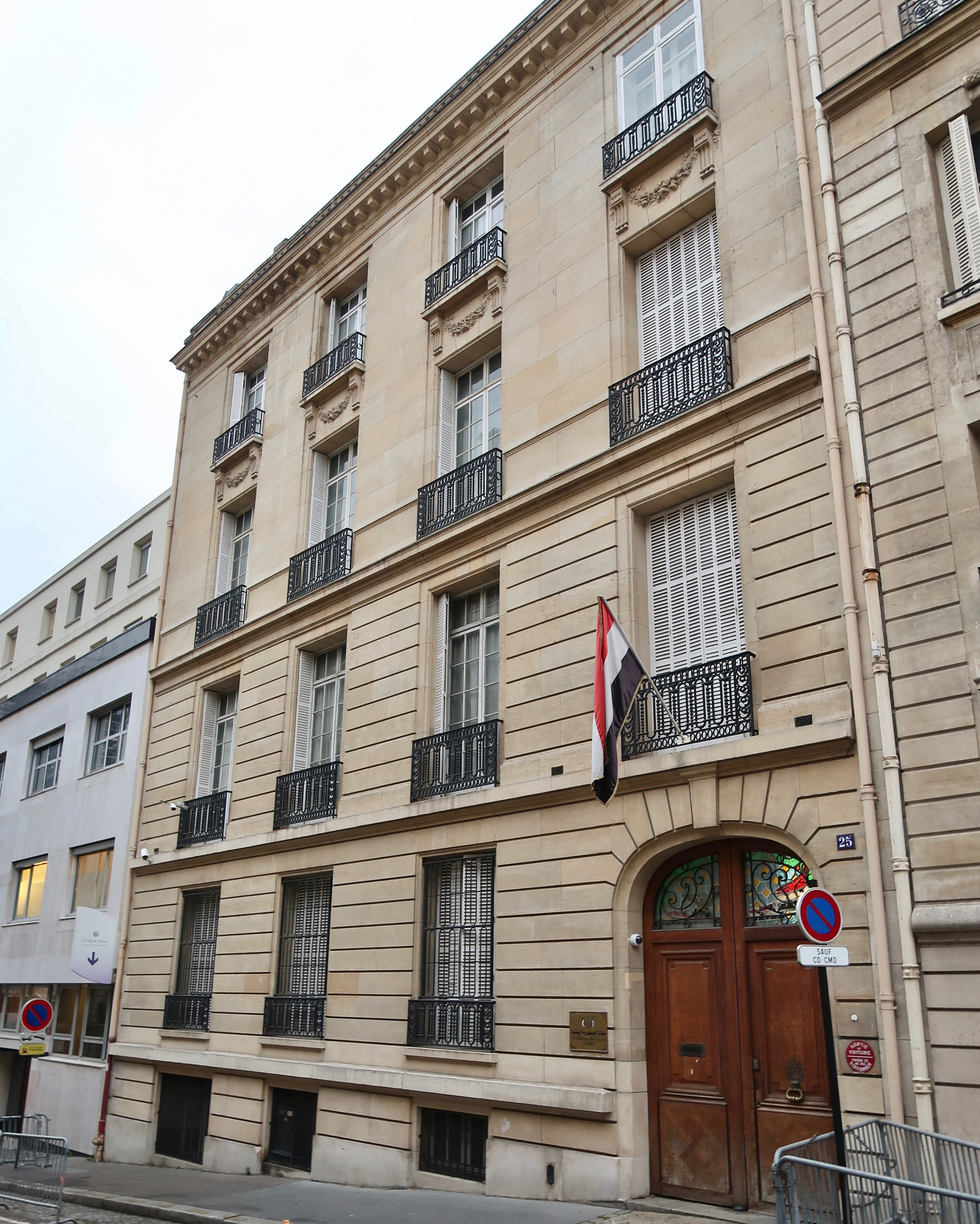 Ambassade du Yémen en France, 25 rue Georges-Bizet (Paris, 16e).